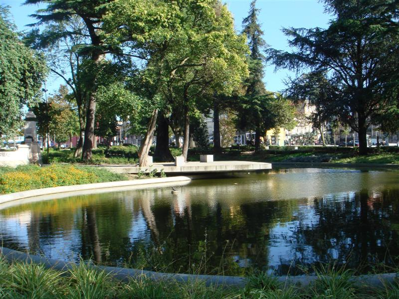 Cordoaria Garden in Porto Portugal